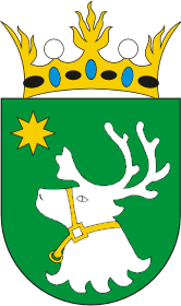 Проект герба Ненецкого автономного округа (2002-2004).